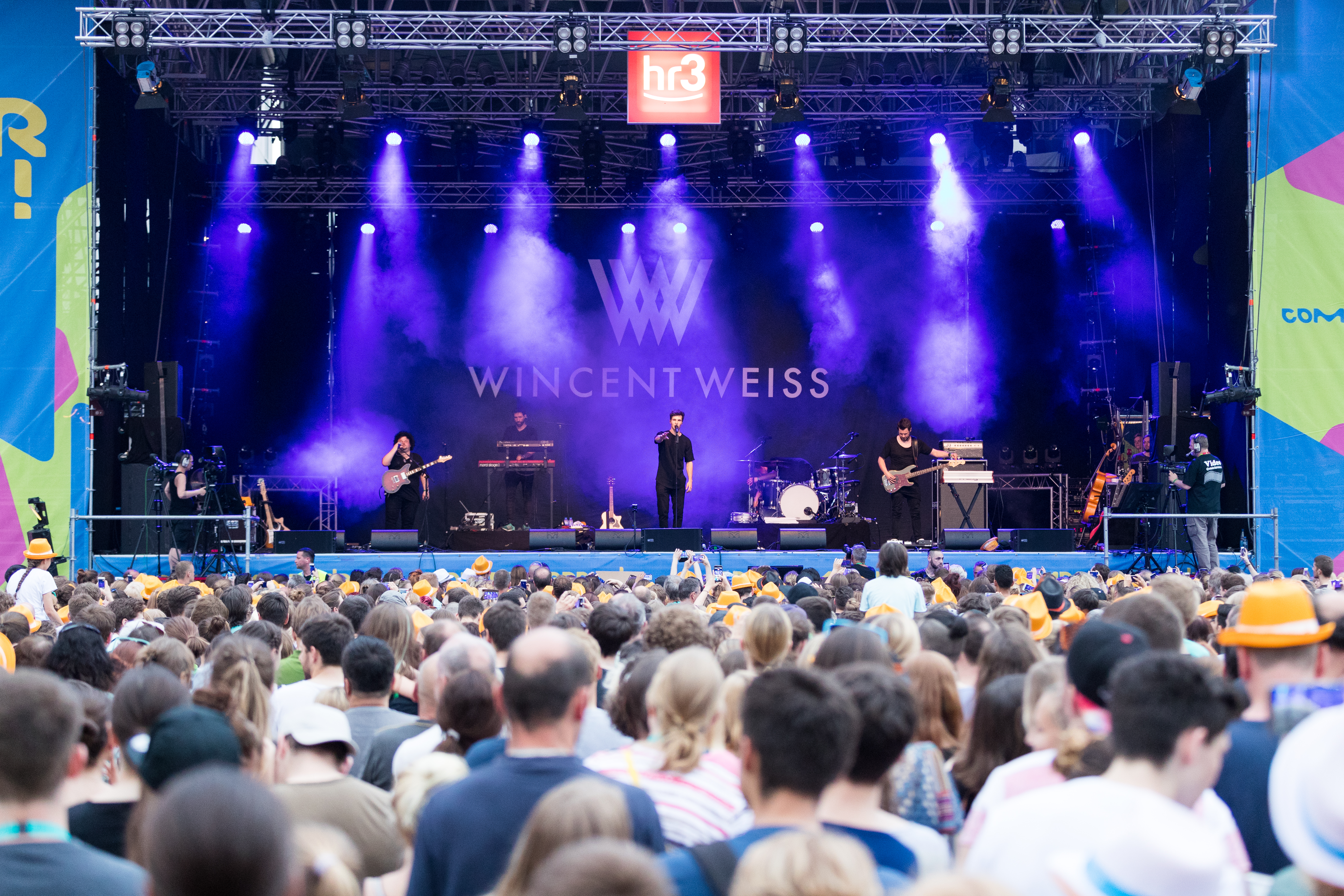 Wincent Weiss during Schlossgrabenfest at , Darmstadt, Hessen, Germany on 2017-05-28, Photo: Sven Mandel